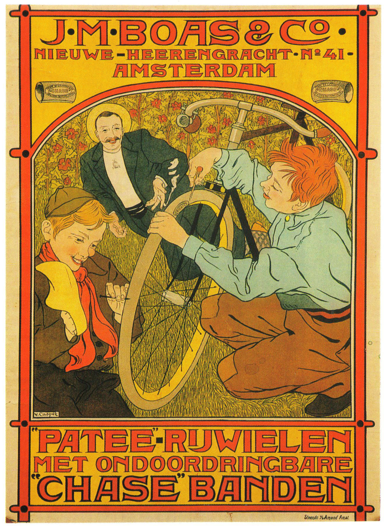 Affiche. "Patee Rijwielen met ondoordringbare Chase Banden".